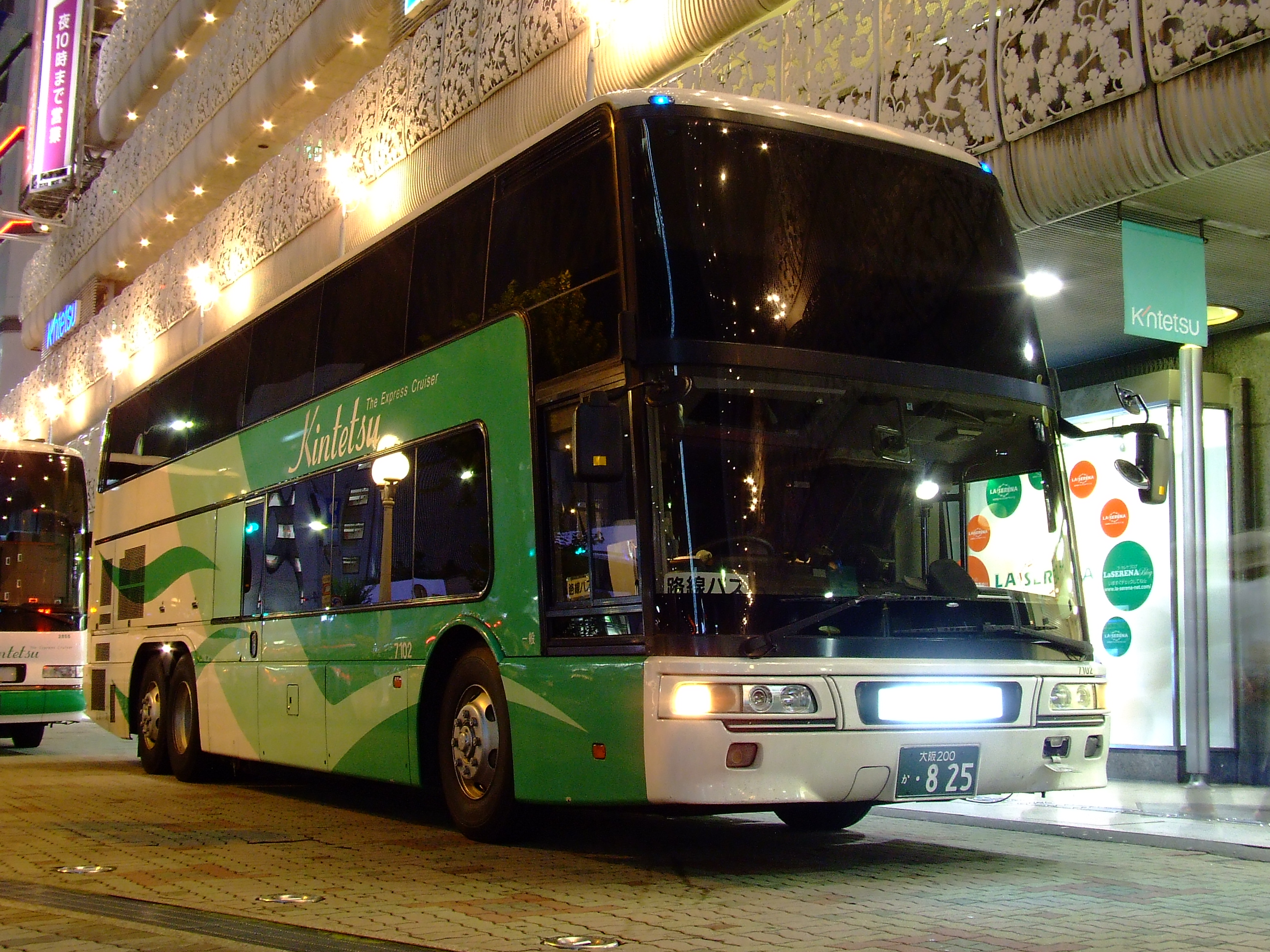 近鉄バスの高速バス「クリスタルライナー」 大阪あべの橋にて